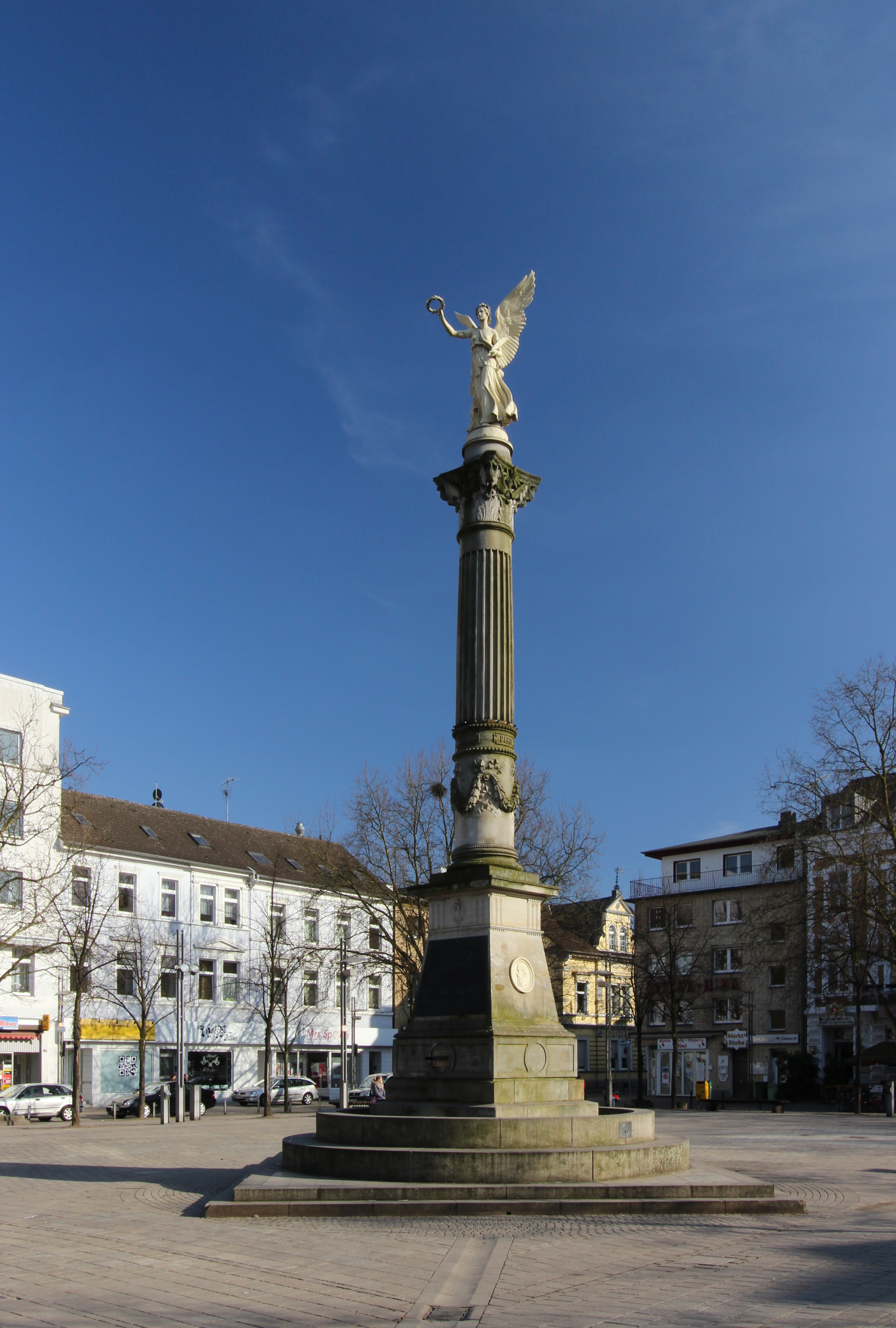 Oberhausen, Siegessäule Nike auf dem Altmarkt